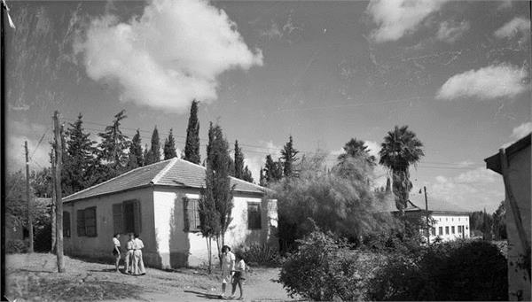 חדרה - מראה חלקי.